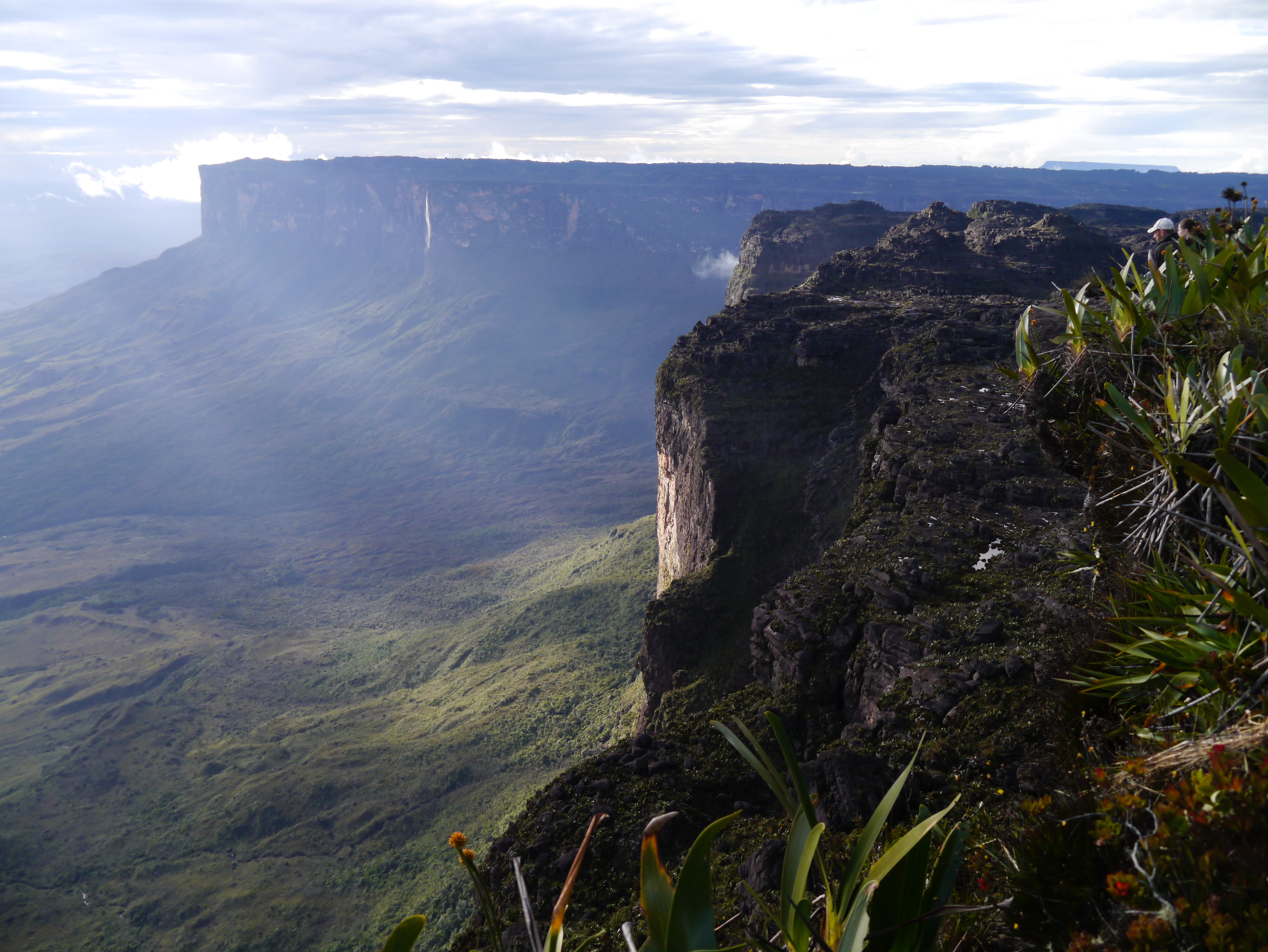 Mount Roraima, Venezuela